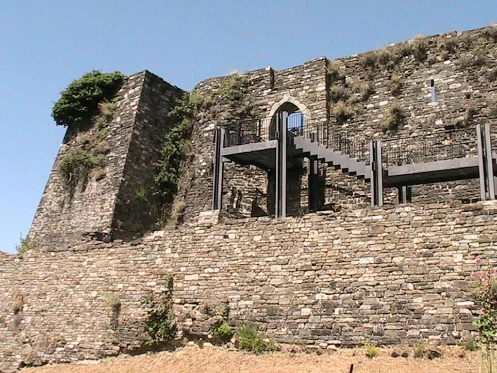 BERCETO - Ruderi del castello